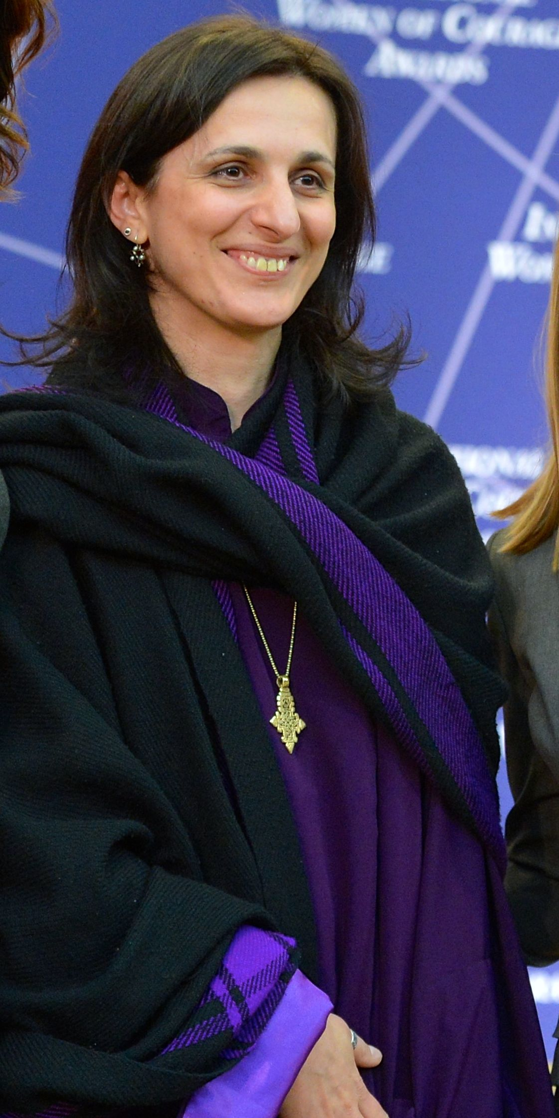 روسودان غوتسيريدز